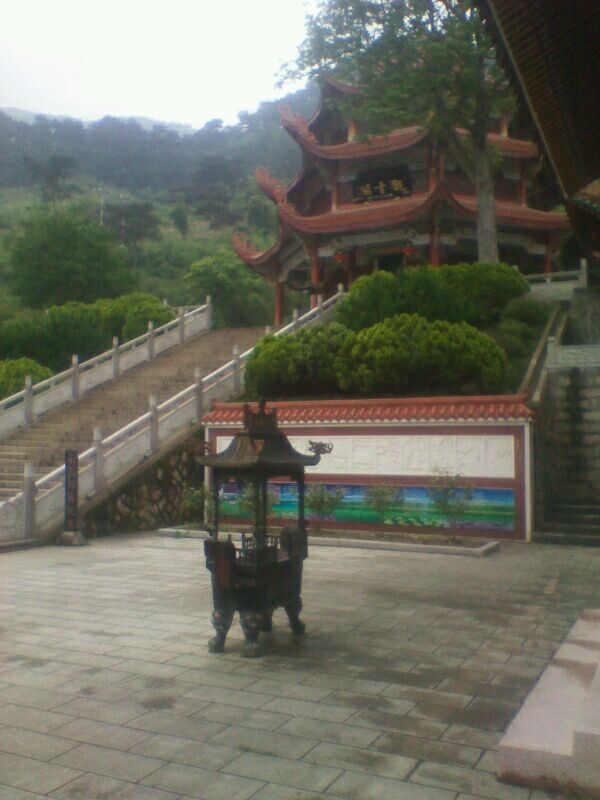 中文（中国大陆）: 霞浦县之古寺